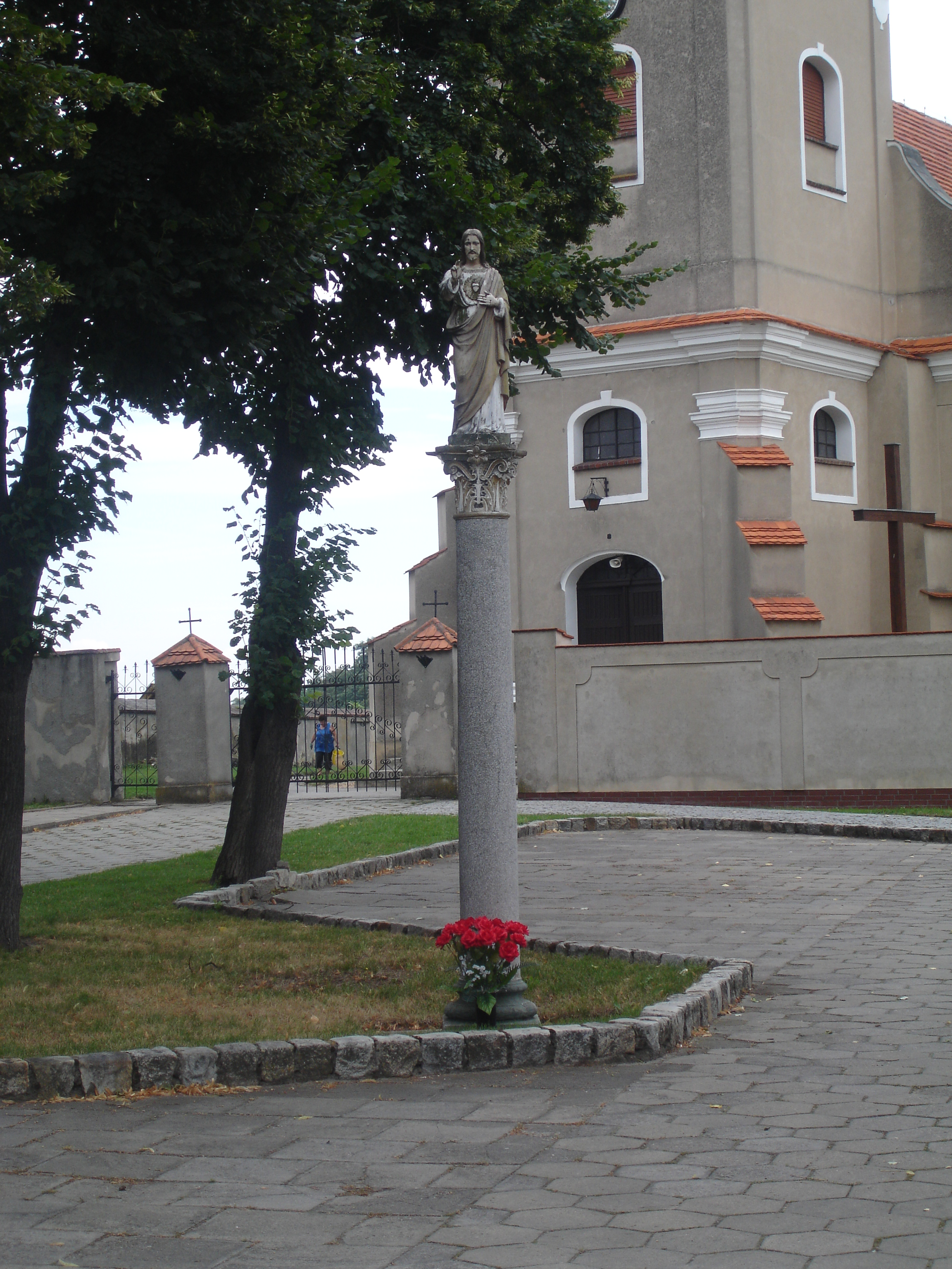 Figura Najświętszego Serca Pana Jezusa w Pawłowicach przy kosciele parafialnym p.w. MB Śnieżnej